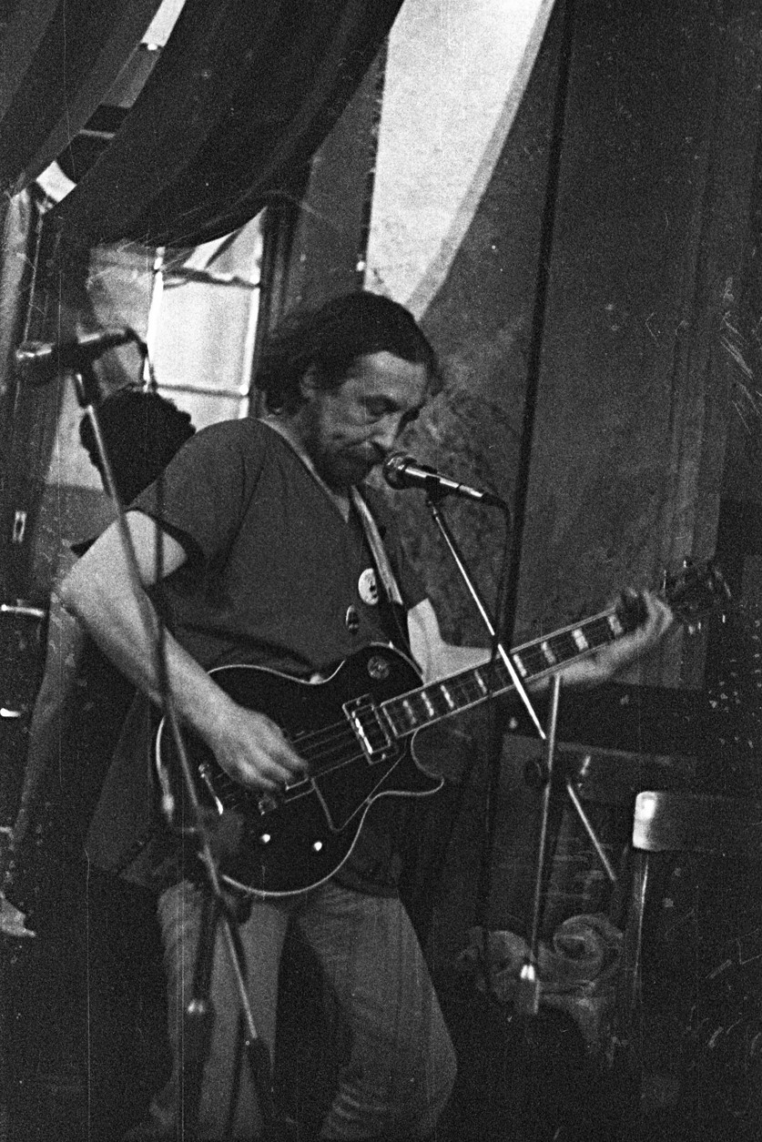 Baskytarista Jasné Páky a Hudby Praha Jan Ivan Wünsch